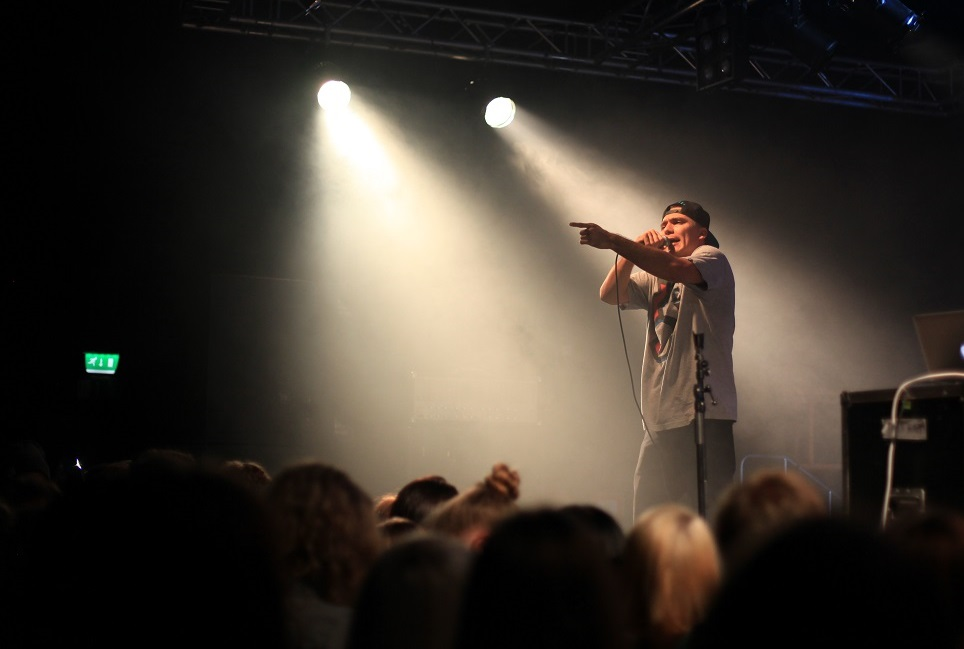 Räppäri Ruudolf esiintymässä ReStartissa vuonna 2013.